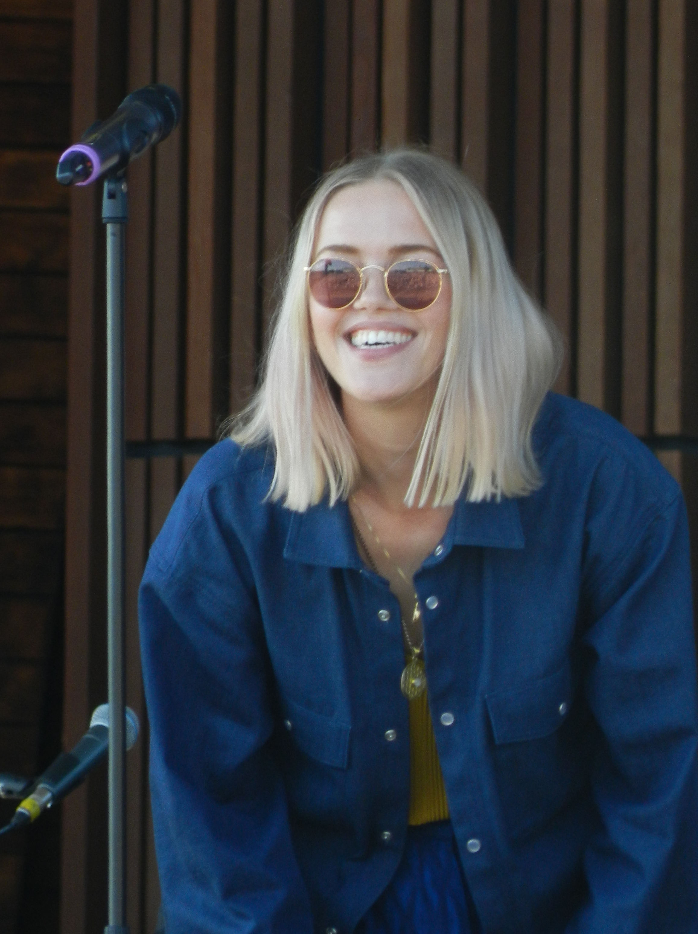 Ana Diaz, september 2018.